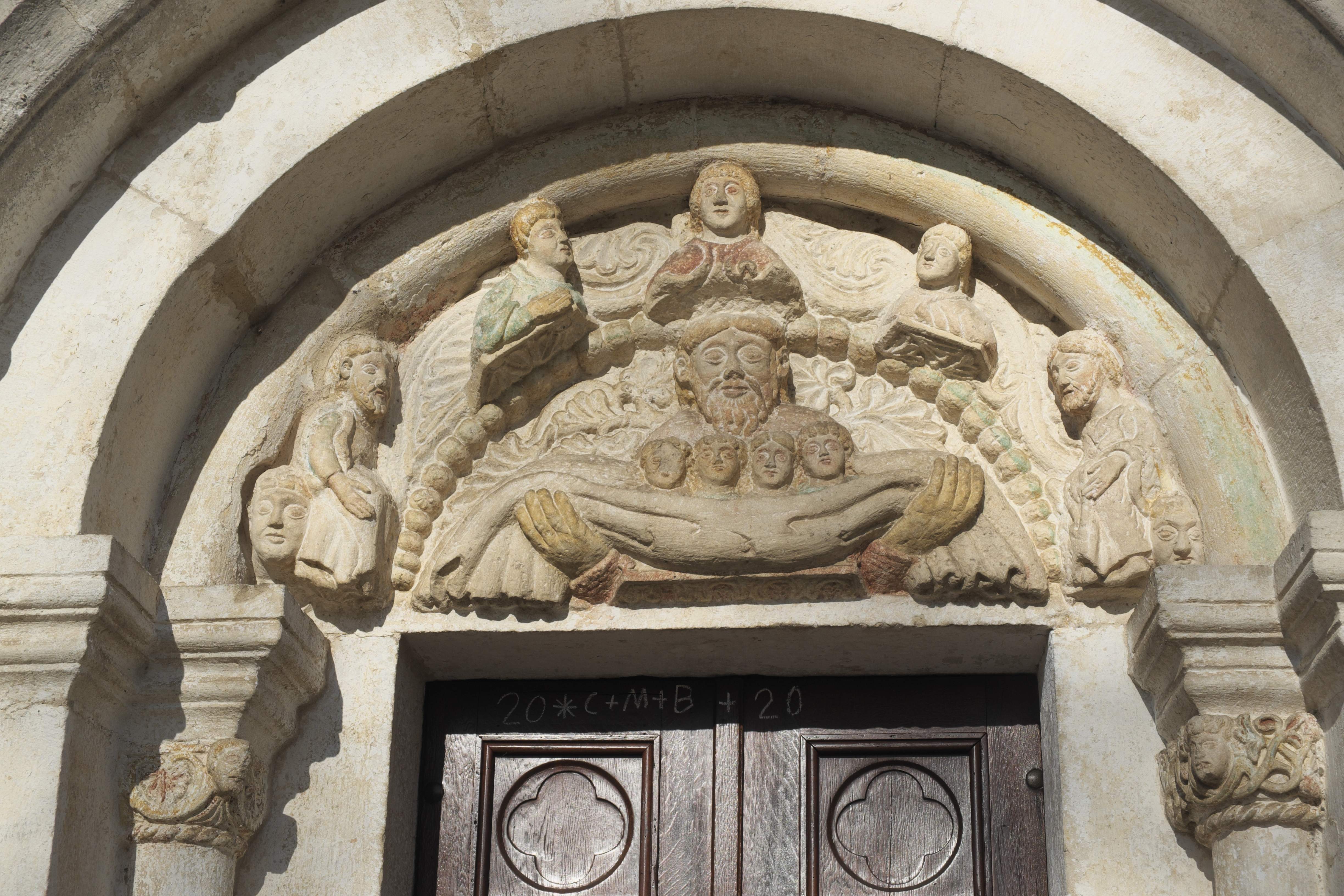 Katholische Pfarrkirche St. Ulrich in Ainau (Geisenfeld) im Landkreis Pfaffenhofen an der Ilm (Bayern/Deutschland), Tympanon des Portals